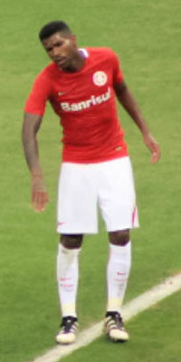 Inter X Cruzeiro pelo Brasileirão de 2016